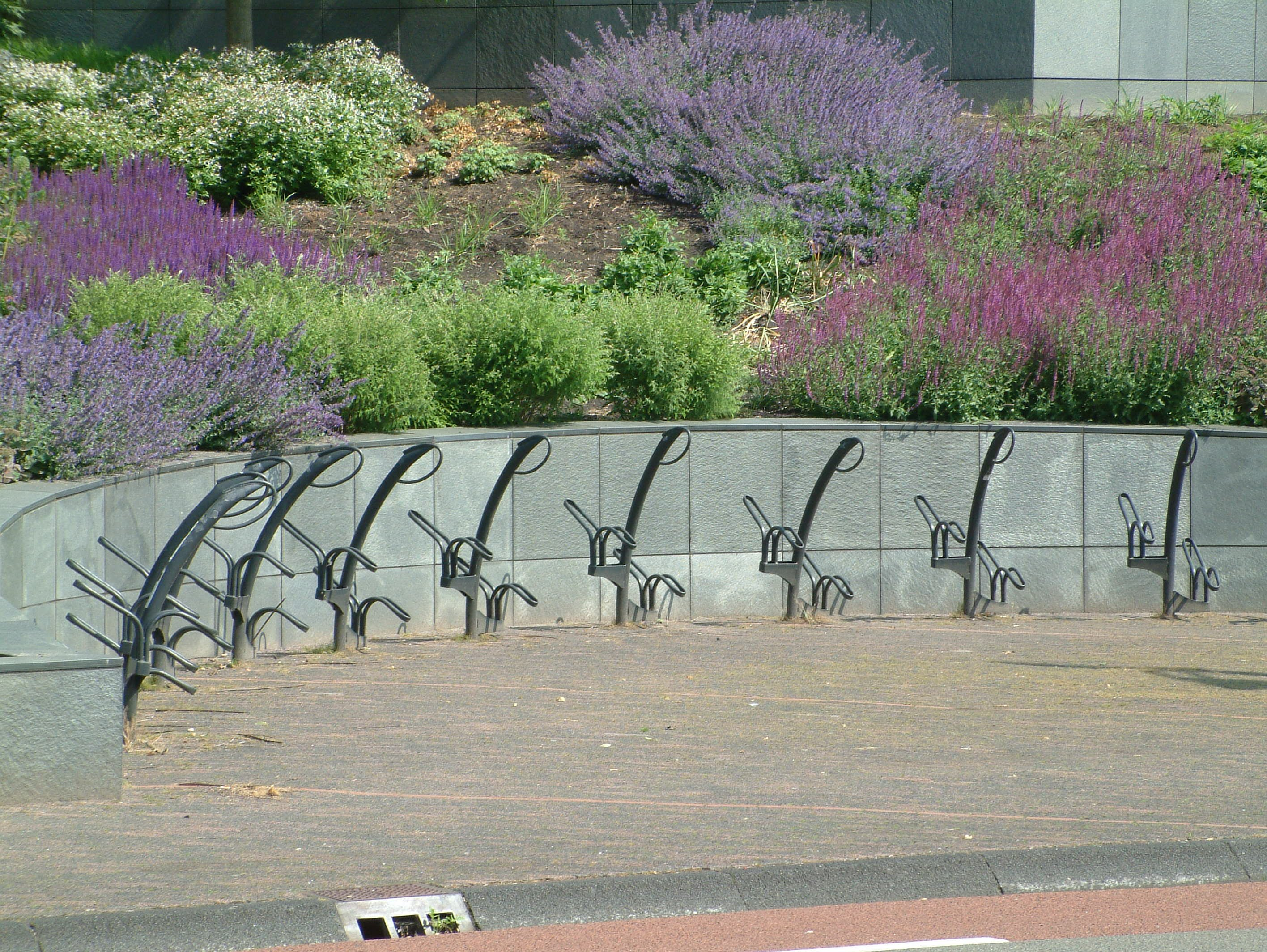 Fietsenrek met beugel. Locatie: van Abbemuseum, Eindhoven (NL).